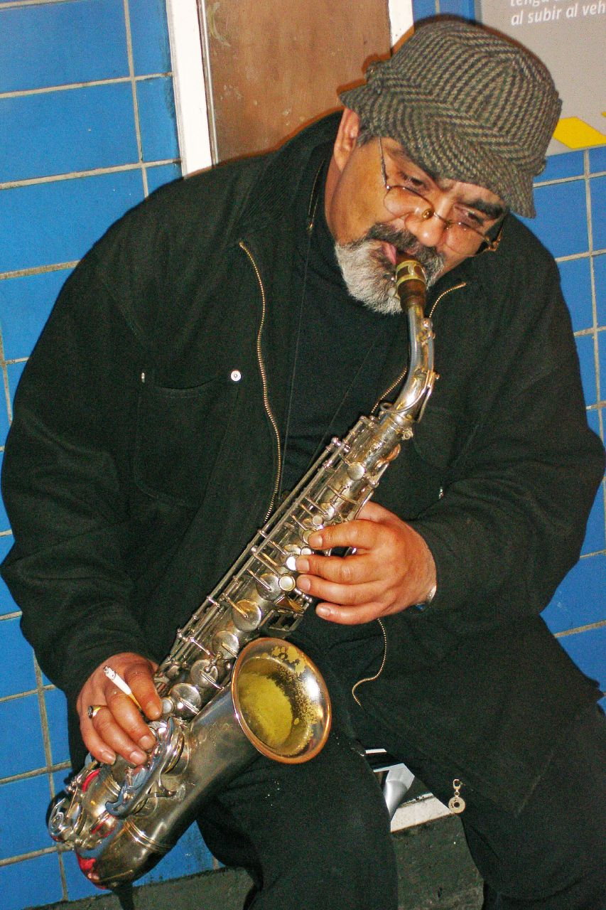 Saxofoon.Musician in the metro 5